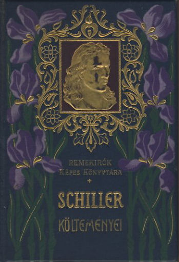 Remekírók Képes Könyvtára sorozat könyvborítója